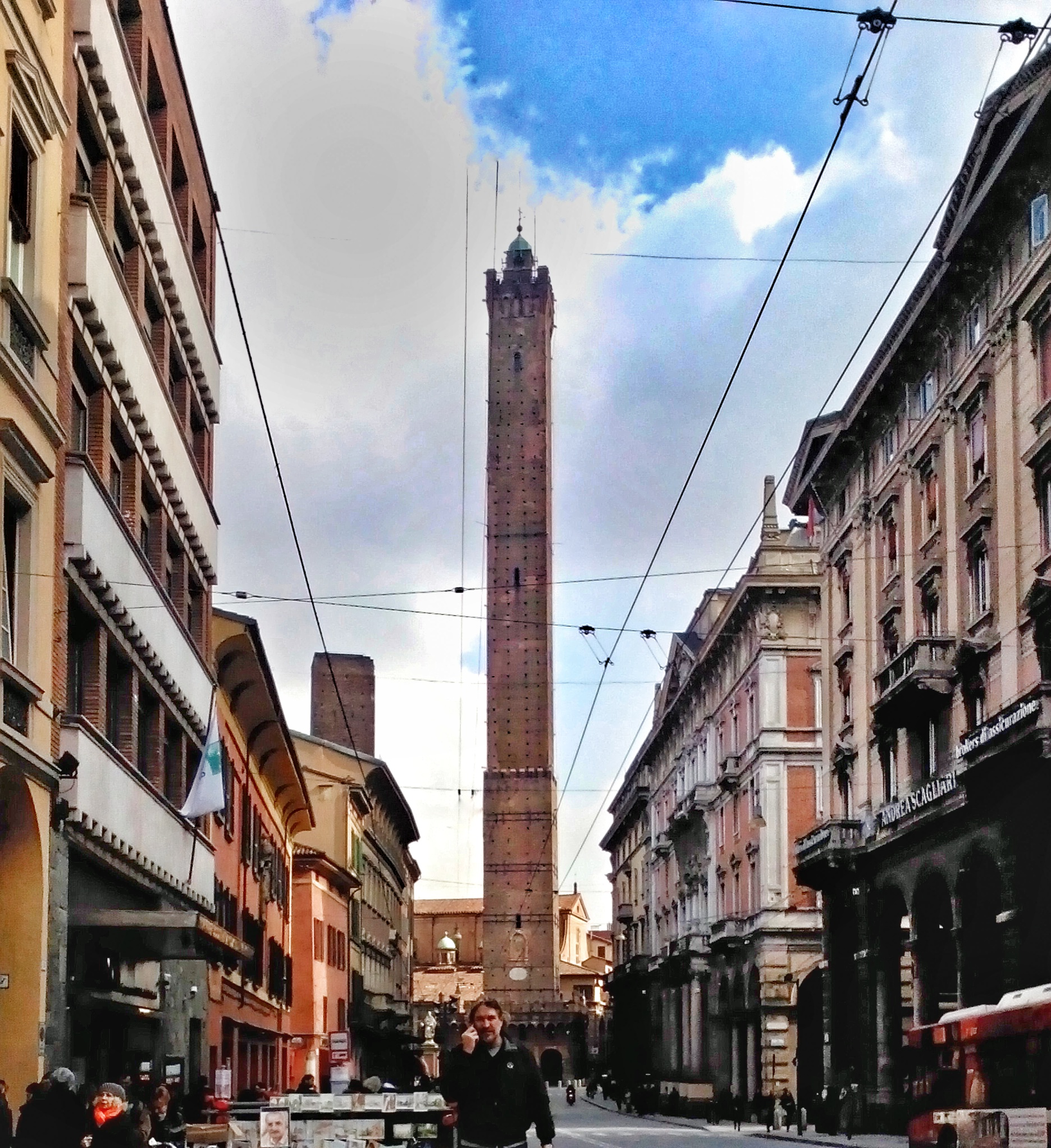 Piazza Maggiore,la panorama di Due Torri dalla via Rizzoli This is a photo of a monument which is part of cultural heritage of Italy.